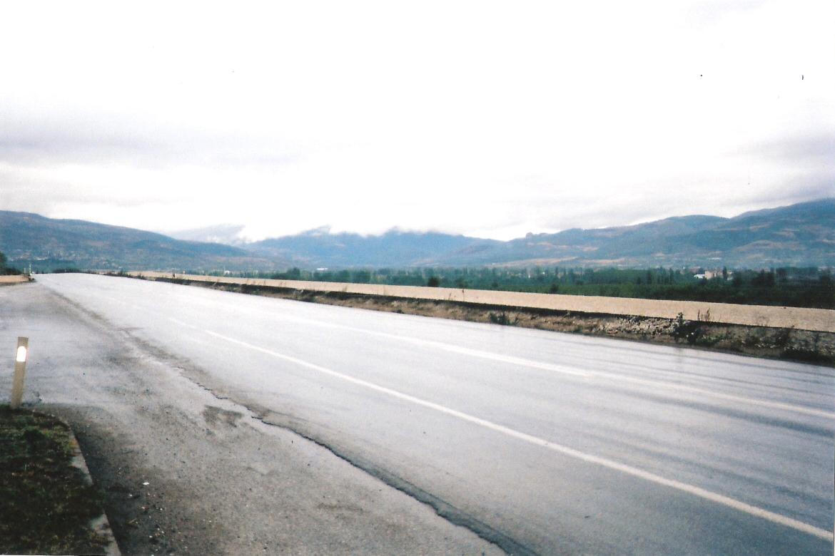 Bilecik-Bozüyük View